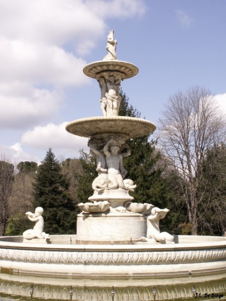 Fuente de las Conchas (18th cent). Campo del Moro, Madrid, Spain